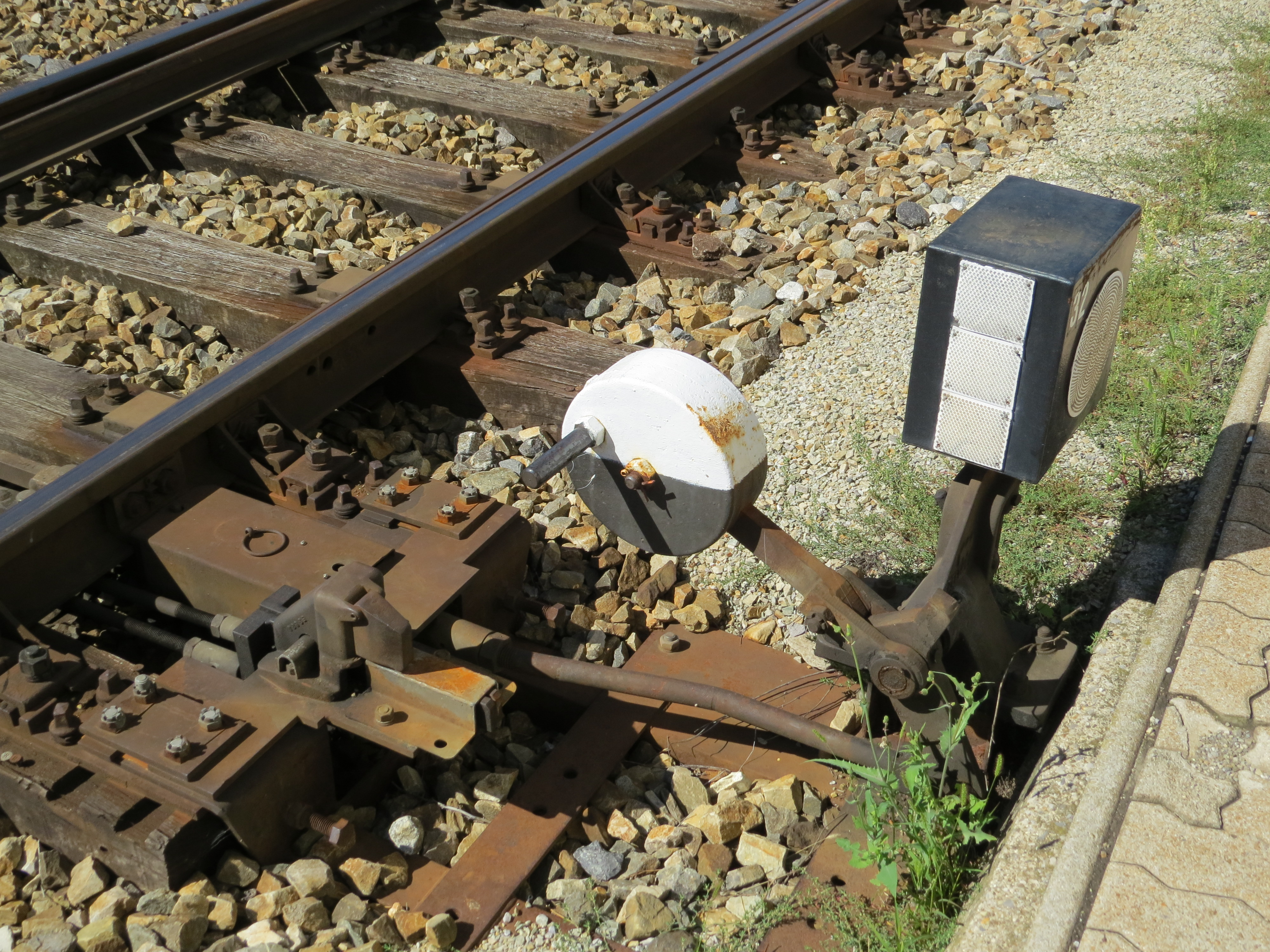 Bahnhof Neulengbach, Handstelleinrichtung einer Weiche mit Riegelhandschloss und verstellbaren Riegelstangen